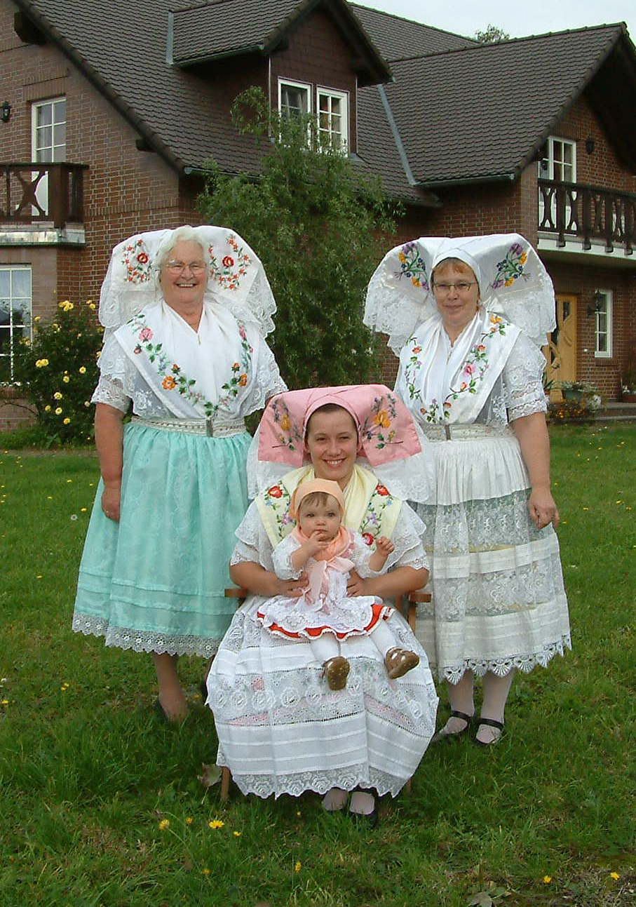 Trachtengenerationen aus Raddusch im Spreewald